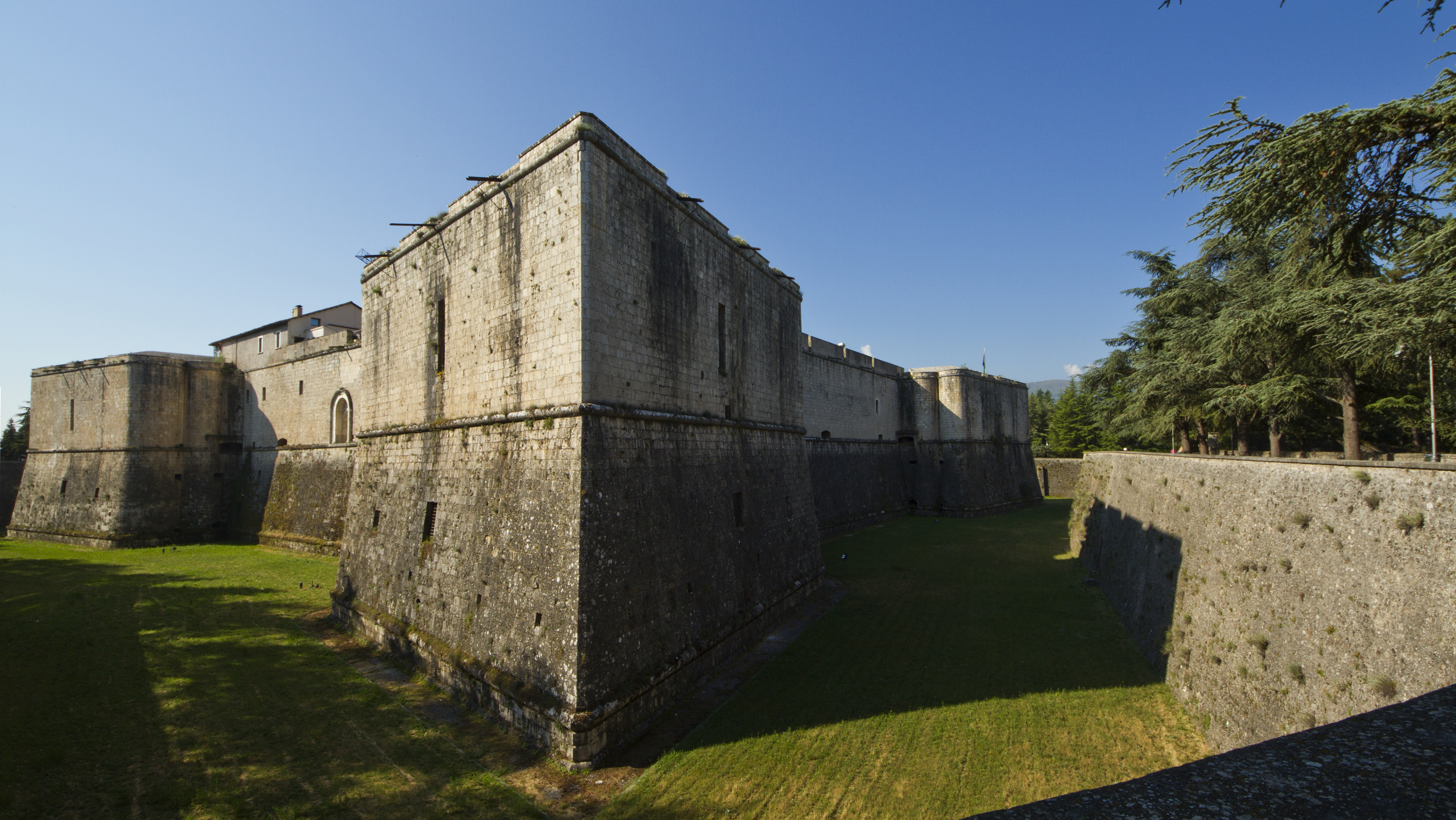 67100 L'Aquila, Italy